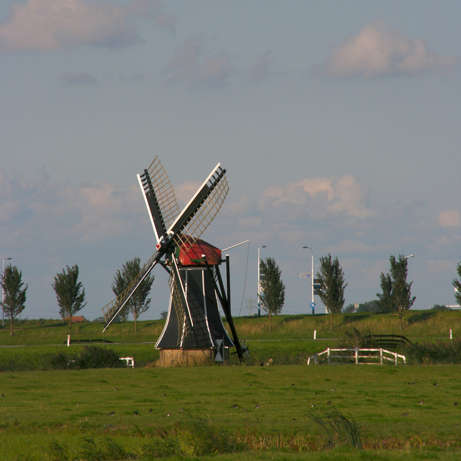 Winsum: molen Langwert